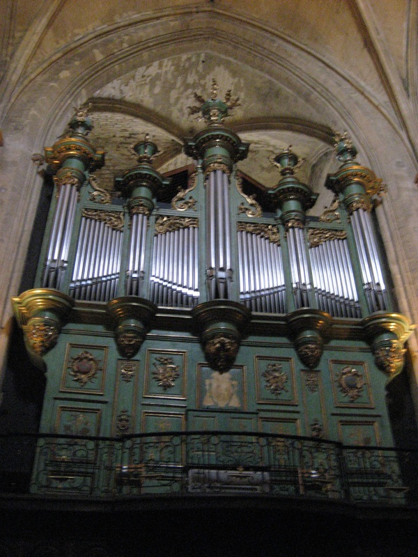 orgue de la cathédrale Saint-Sauveur, Aix-en-Provence